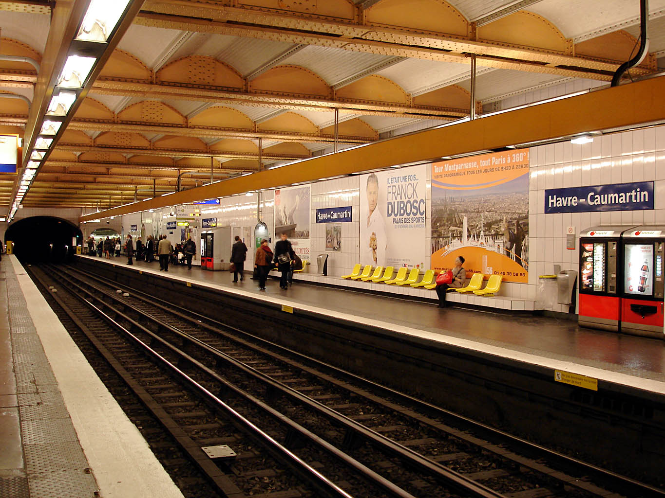 Station Havre - Caumartin de la ligne 3 du métro de Paris, France.